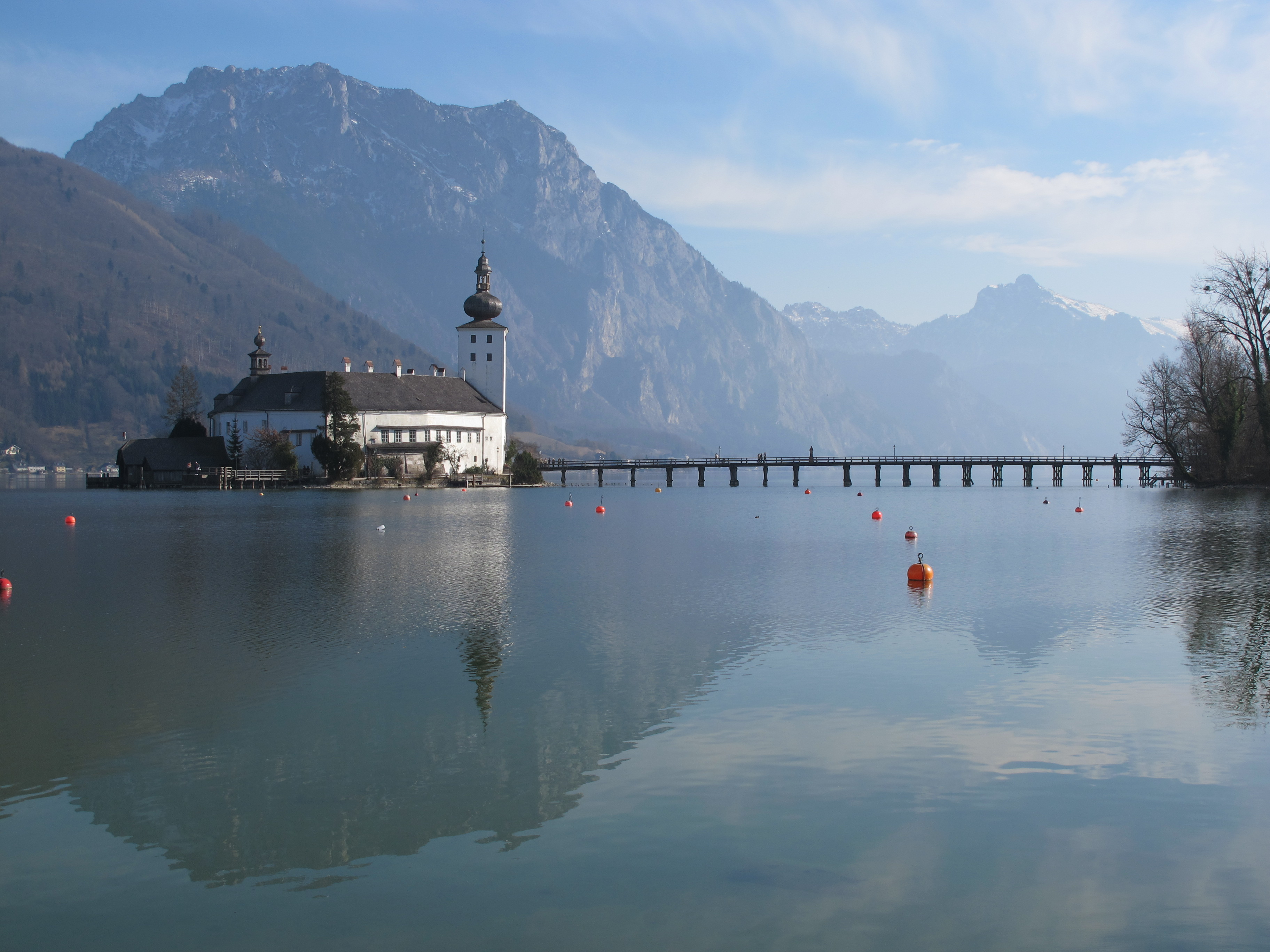 Seeschloß Orth samt Zugangsbrücke